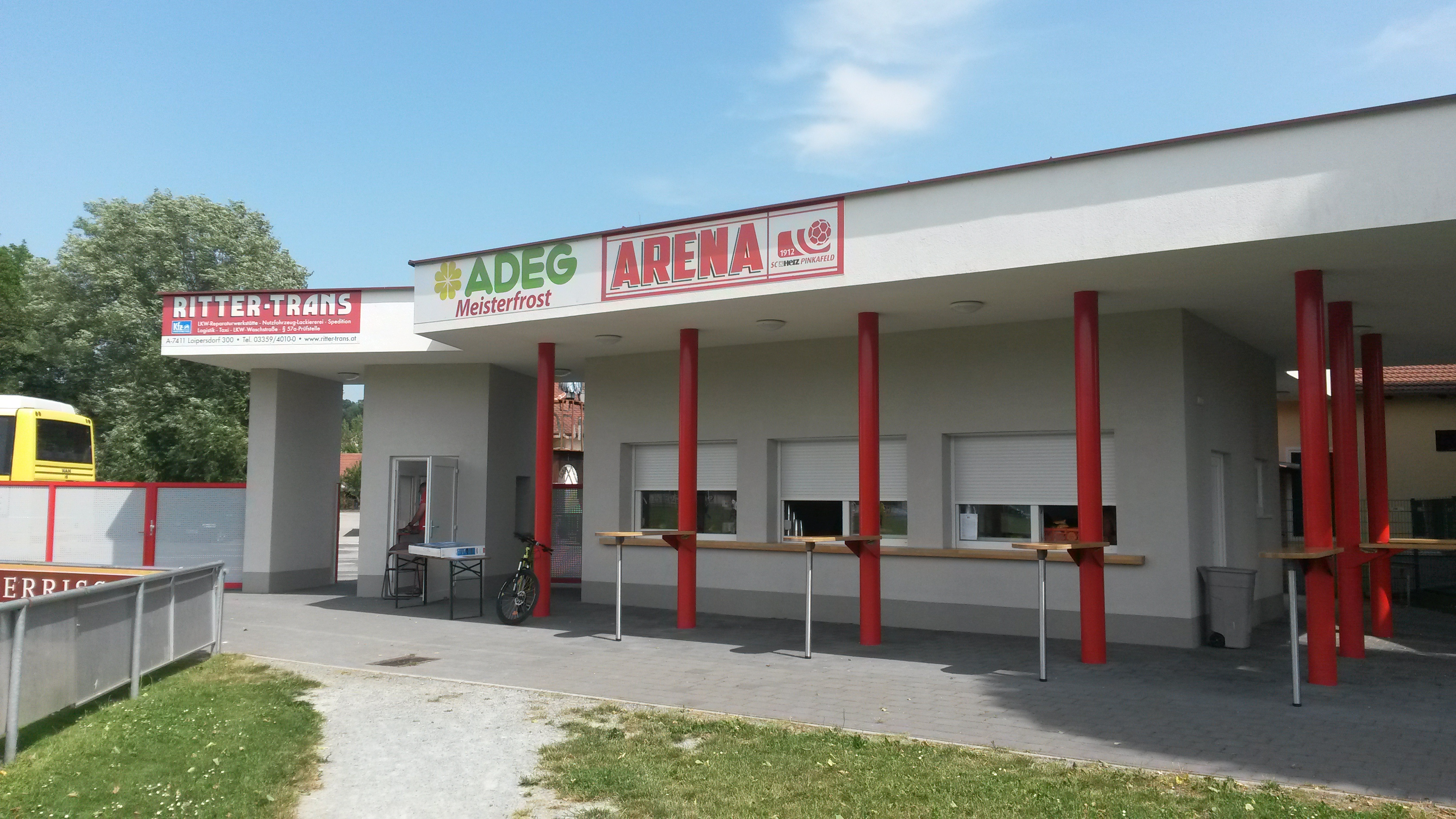 Kantine im Eingangsbereich